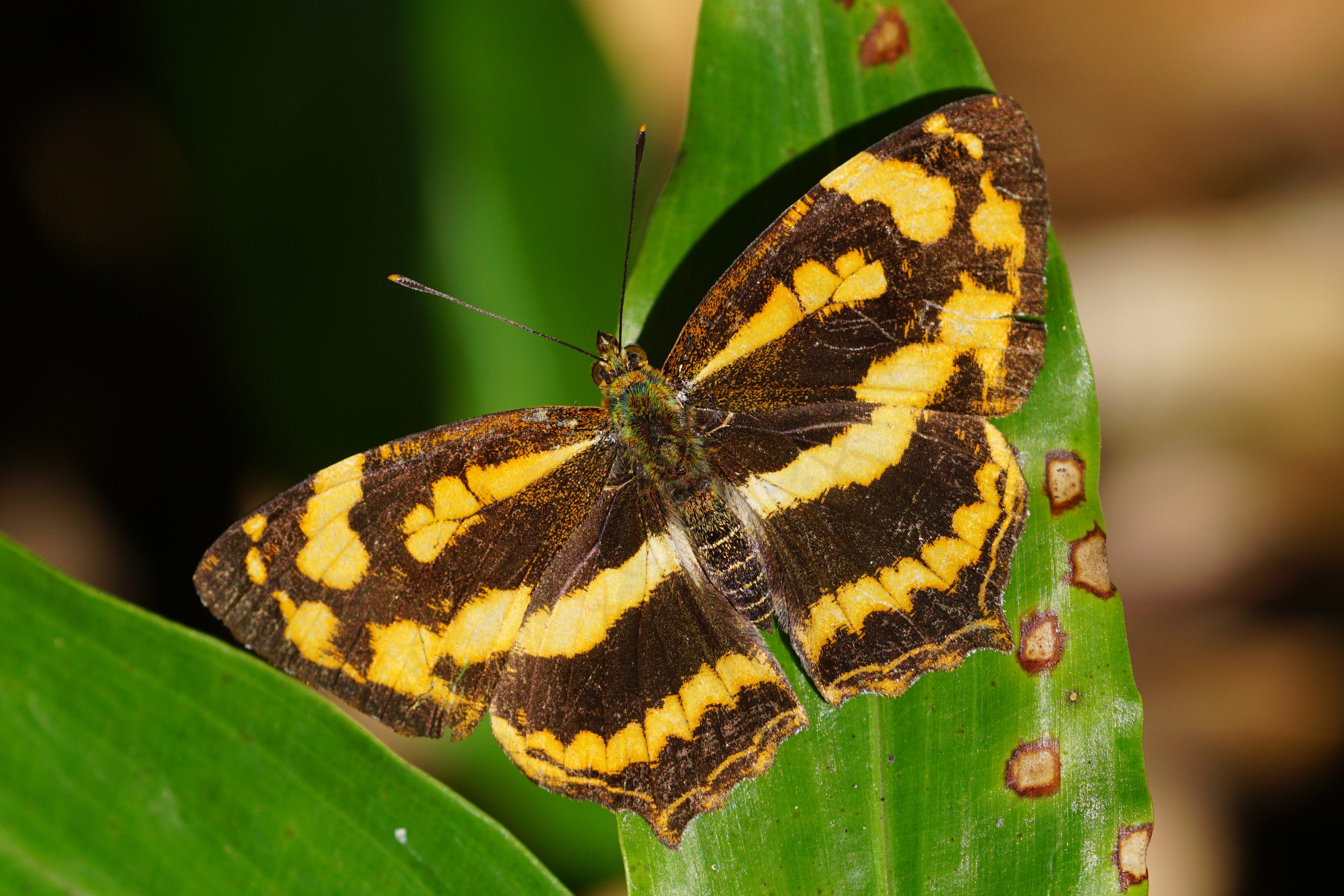 散紋盛蛺蝶 Symbrenthia lilaea lunica